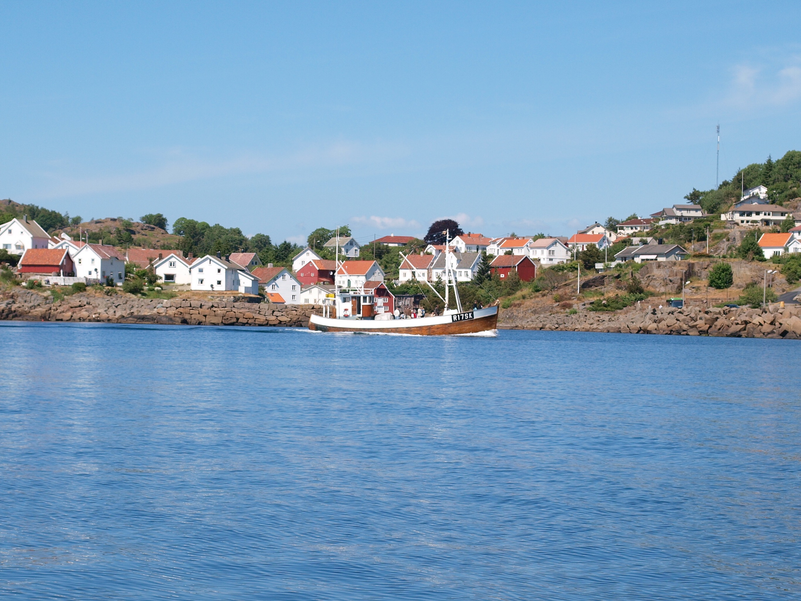 Sogndalstrand fra sjøen med MS Sjødis i forgrunnen.